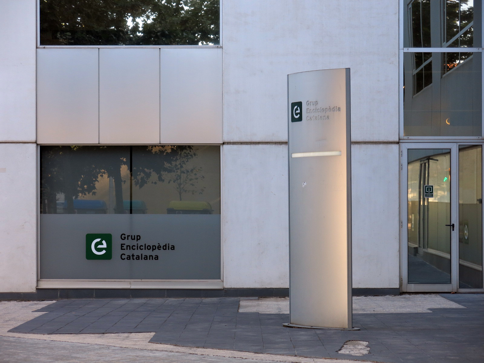 Grup Enciclopèdia Catalana, c. Josep Pla (Barcelona)